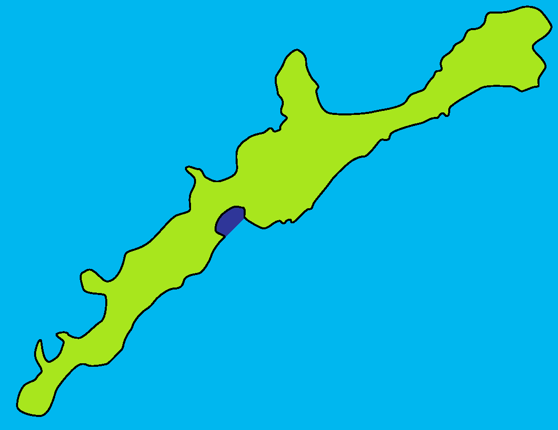 単冠湾の範囲を示した地図。 海岸線そのものは白地図専門店より。